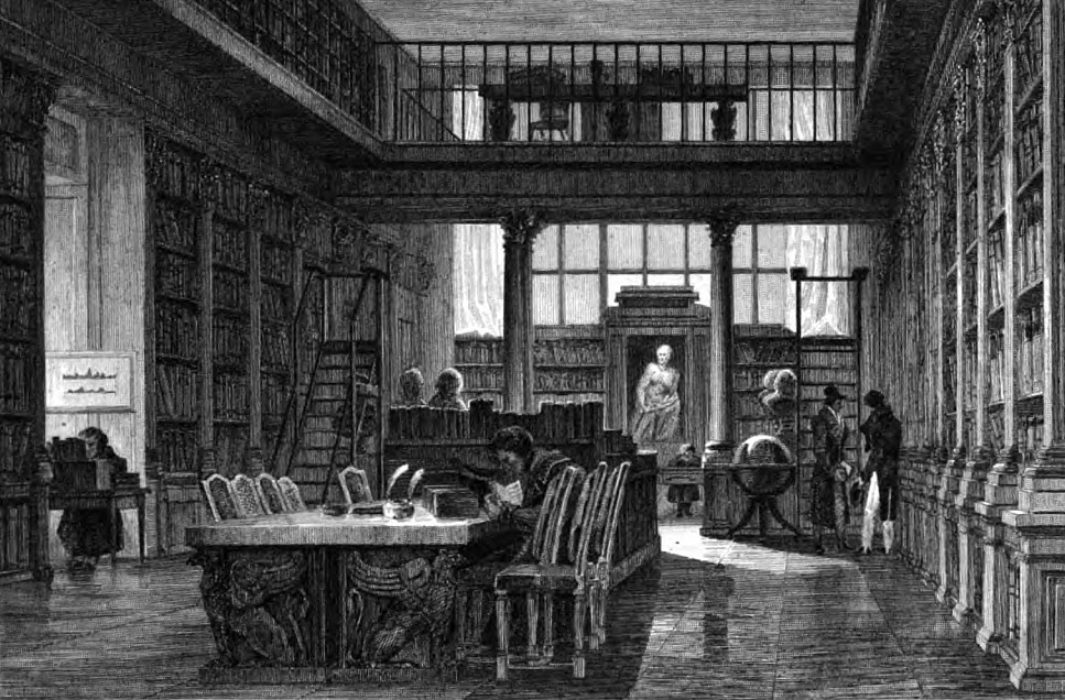 Bibliothèque de l'Institut à Paris dessiné et gravé par Augustin-François Lemaître 1797-1870. Dictionnaire de l'Académie française 1835